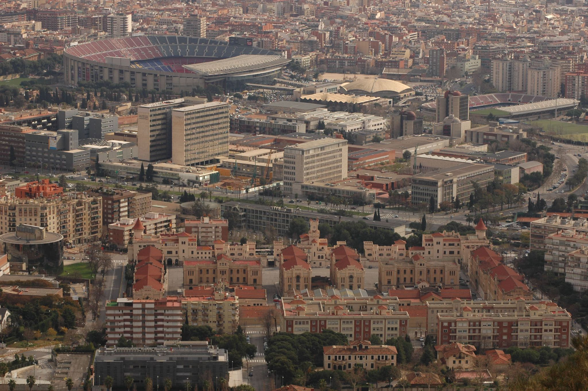 Vista des de sant Pere Màrtir, del districte de Les Corts, Barcelona. (Camp Nou, Quater del Bruc, etc)